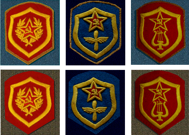 знаки ОРПК